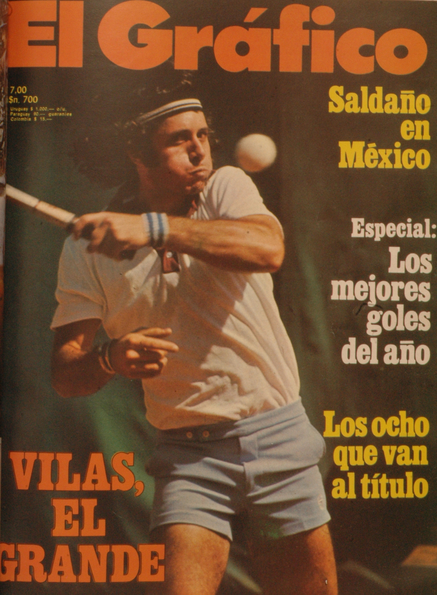 El Grafico del 27 de Noviembre de 1974. Edicion 2877